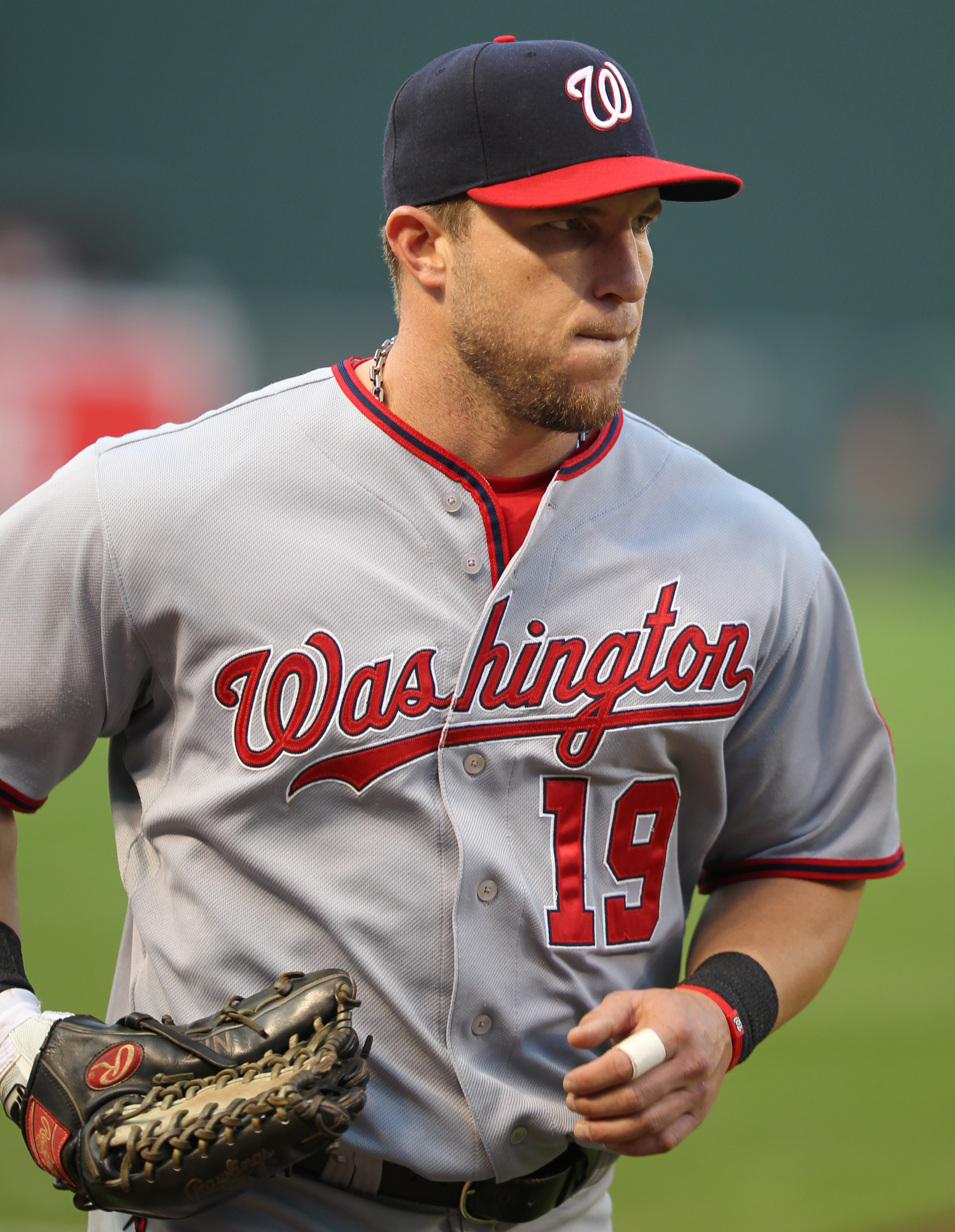 Laynce Nix